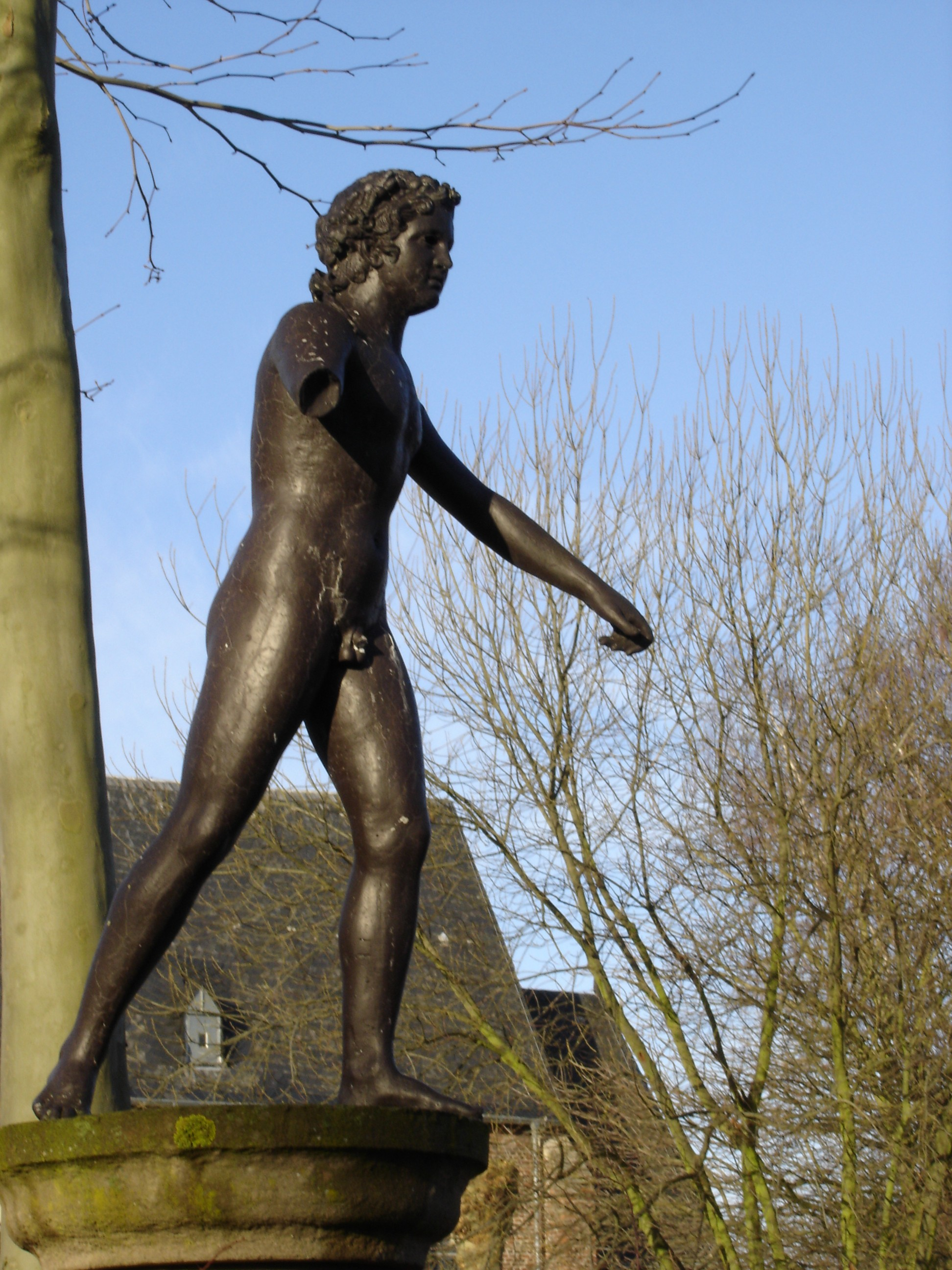 "Lüttiger Knabe" selbst fotografiert von Benutzer:Xantener am 29. Dez 2004 Lizenz: GFDL